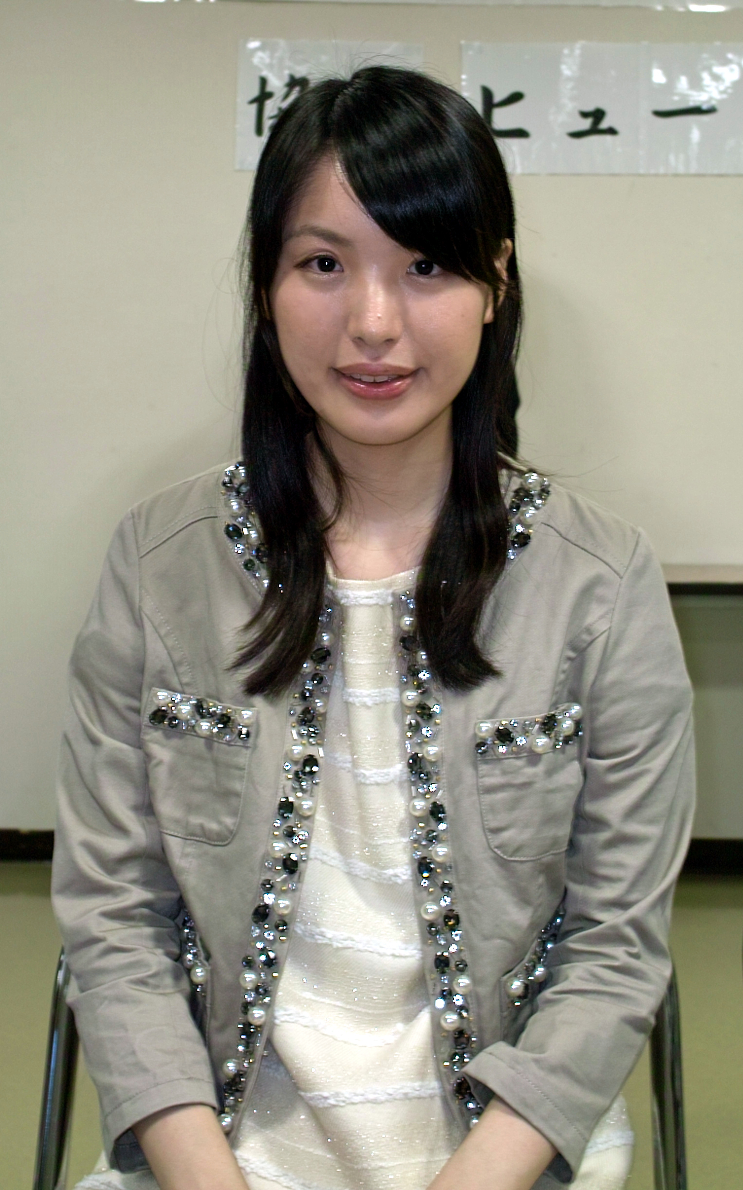 2015年10月4日、棋士会みやぎ復興フェスティバルにて